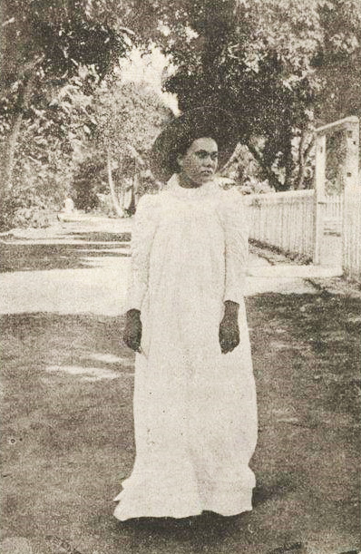 Teapapaa, Reine de Huahine. Photographies de M. Agostini, membre de la mission Chessé.